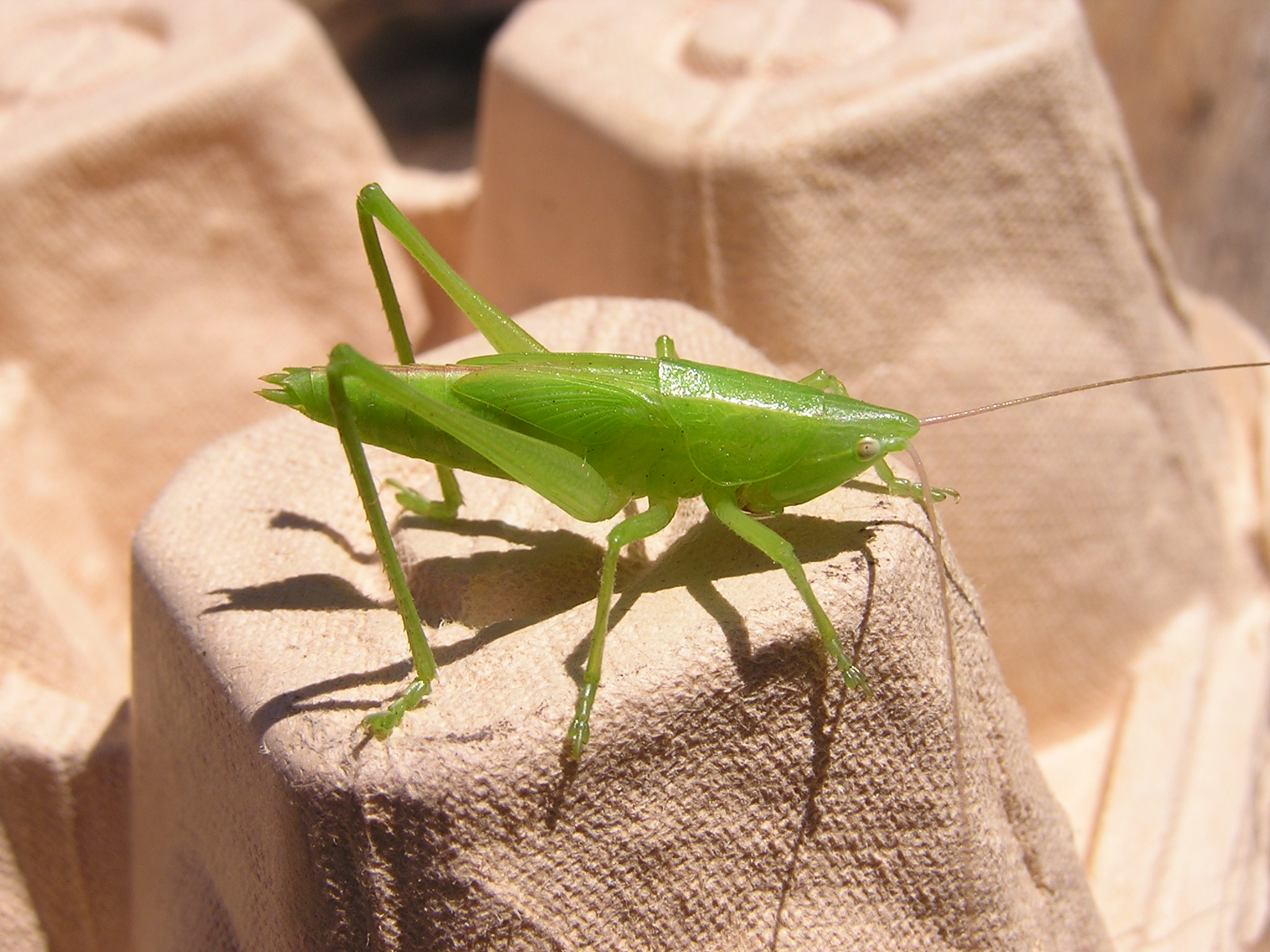 Нимфа кузнечика (сем. Tettigoniidae), скорее всего, Conocephalus, сфотографировано в посёлке Белосарайская коса, июль 2007